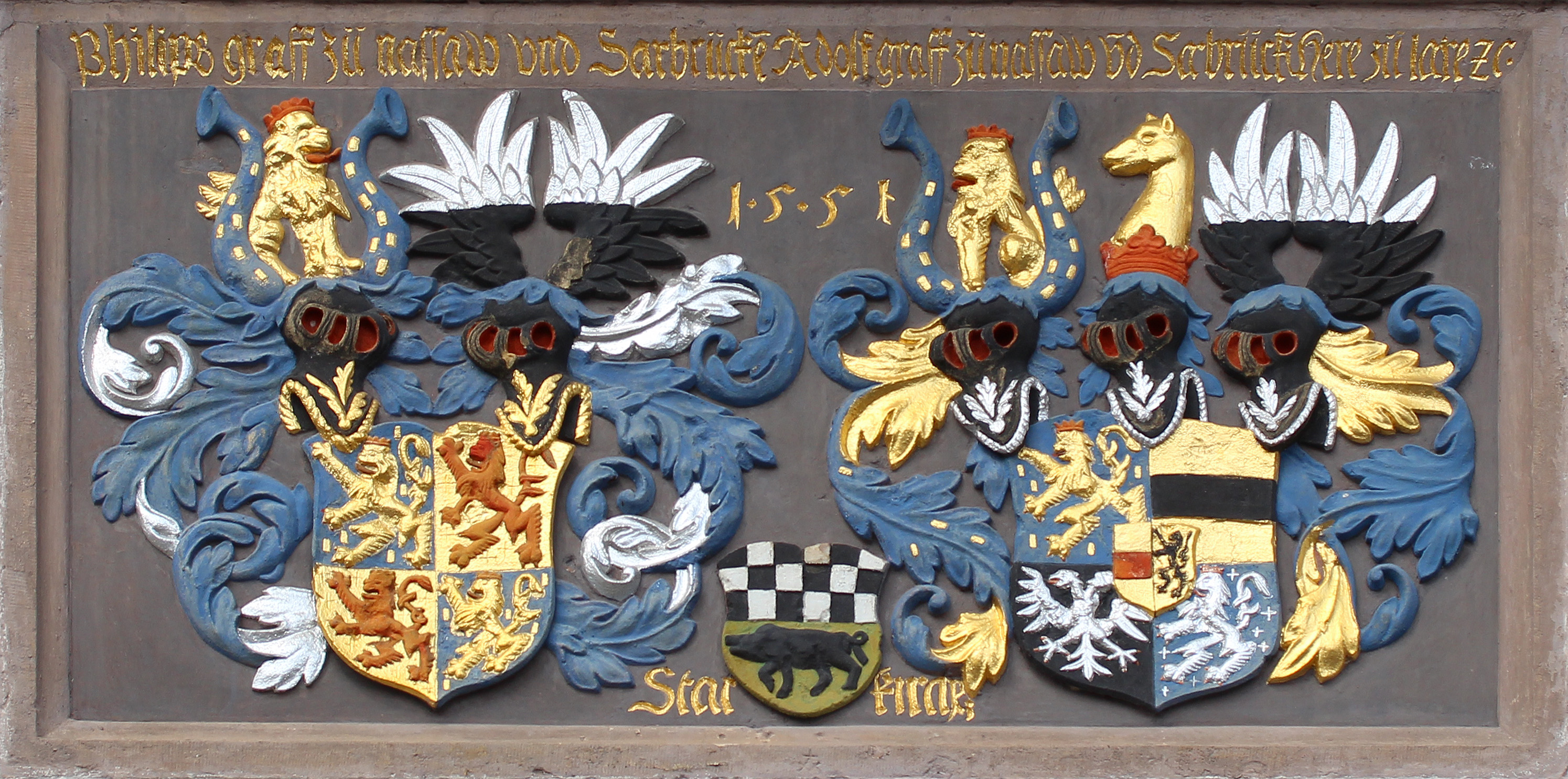 Wappenstein am alten Rathaus von Kirchheimbolanden. Links: Nassau-Saarbrücken; rechts: Kombinationswappen: Nassau-Saarbrücken mit den Wappen der Grafen von Saarwerden, Moers und Lahr-Mahlberg